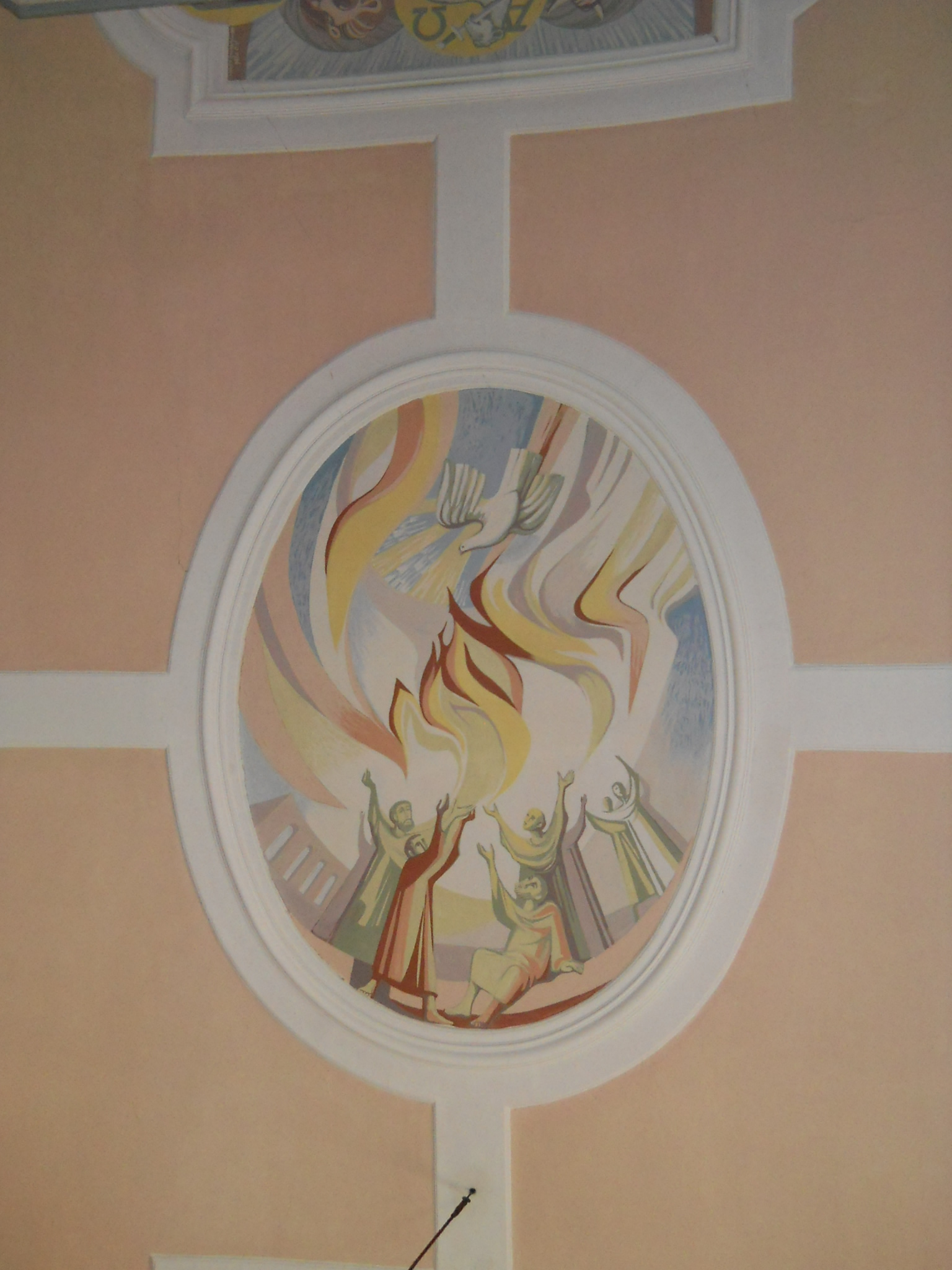 Dittenheim, Gemeinde im mittelfränkischen Landkreis Weißenburg-Gunzenhausen (Bayern), evang.-luth. Pfarrkirche St. Peter und Paul, Deckengemälde